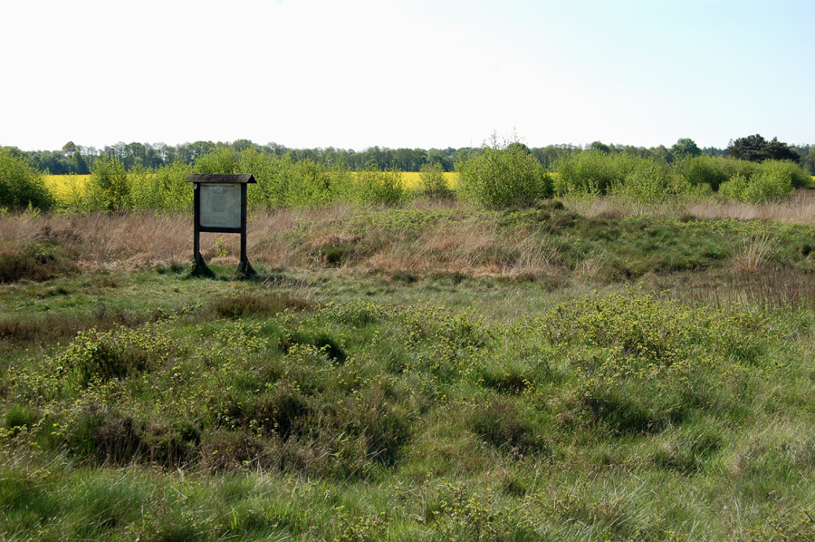 Heideflächen mit niedrigen Grabhügeln in der Steinalkenheide